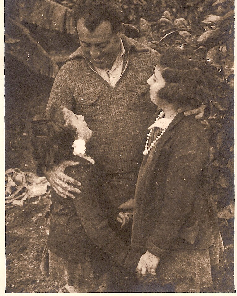 יהודה צרפתי עם רות משמאל ושולמית